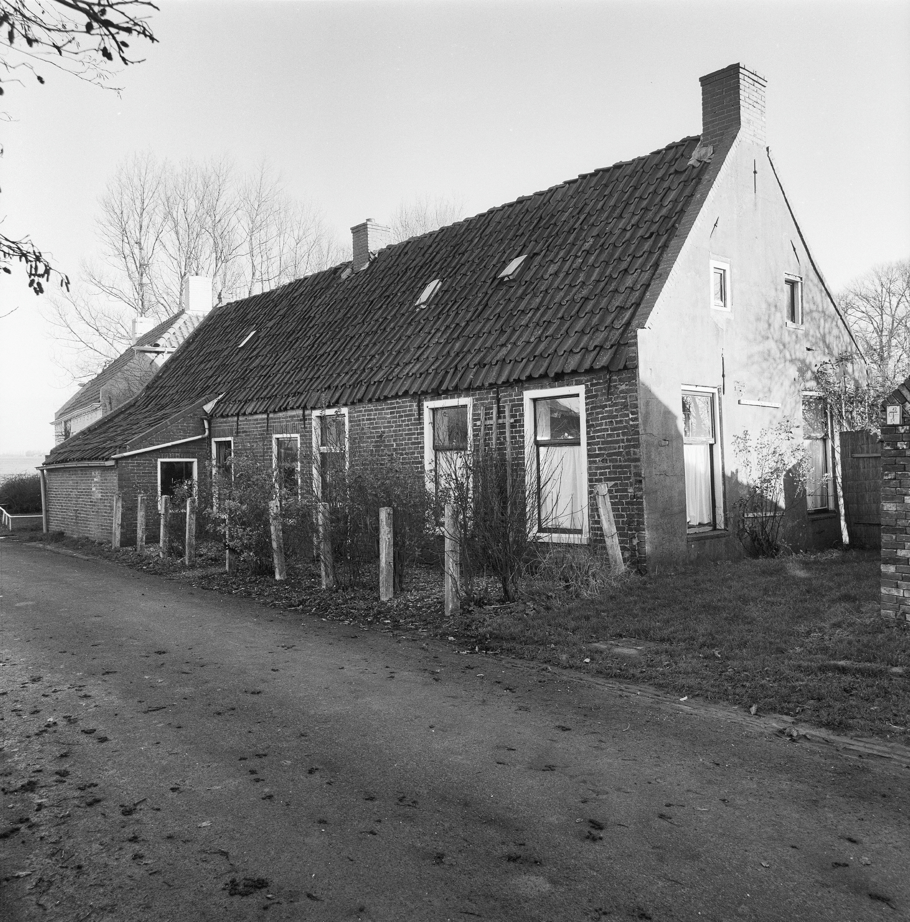 Exterieur VOORGEVEL EN LINKER ZIJGEVEL